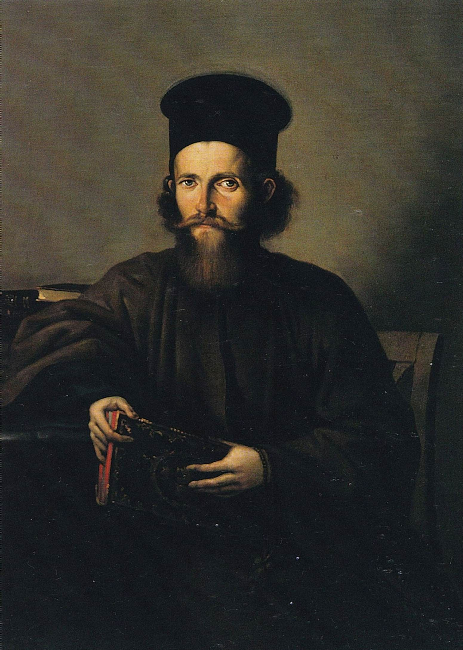 Portretul lui călugărului Isaia Piersiceanu